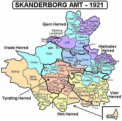 Skanderborg Amt - kortet er udarbejdet af Svend-Erik Christiansen. Farvelagt af Twid. Med blålige nuancer er vist kommuner i Århus Amt, og med gule og røde nuancer er vist kommuner i Vejle Amt. Kopieret fra den danske Wikipedia. Map of Skanderborg County, Denmark (-1970). Map by Svend-Erik Christiansen. Colours by Twid. The blue colours show parts of the province that became part of Århus County in 1970. The red and yellow areas were transferred to Vejle County in 1970. Copied from the Danish Wikipedia.